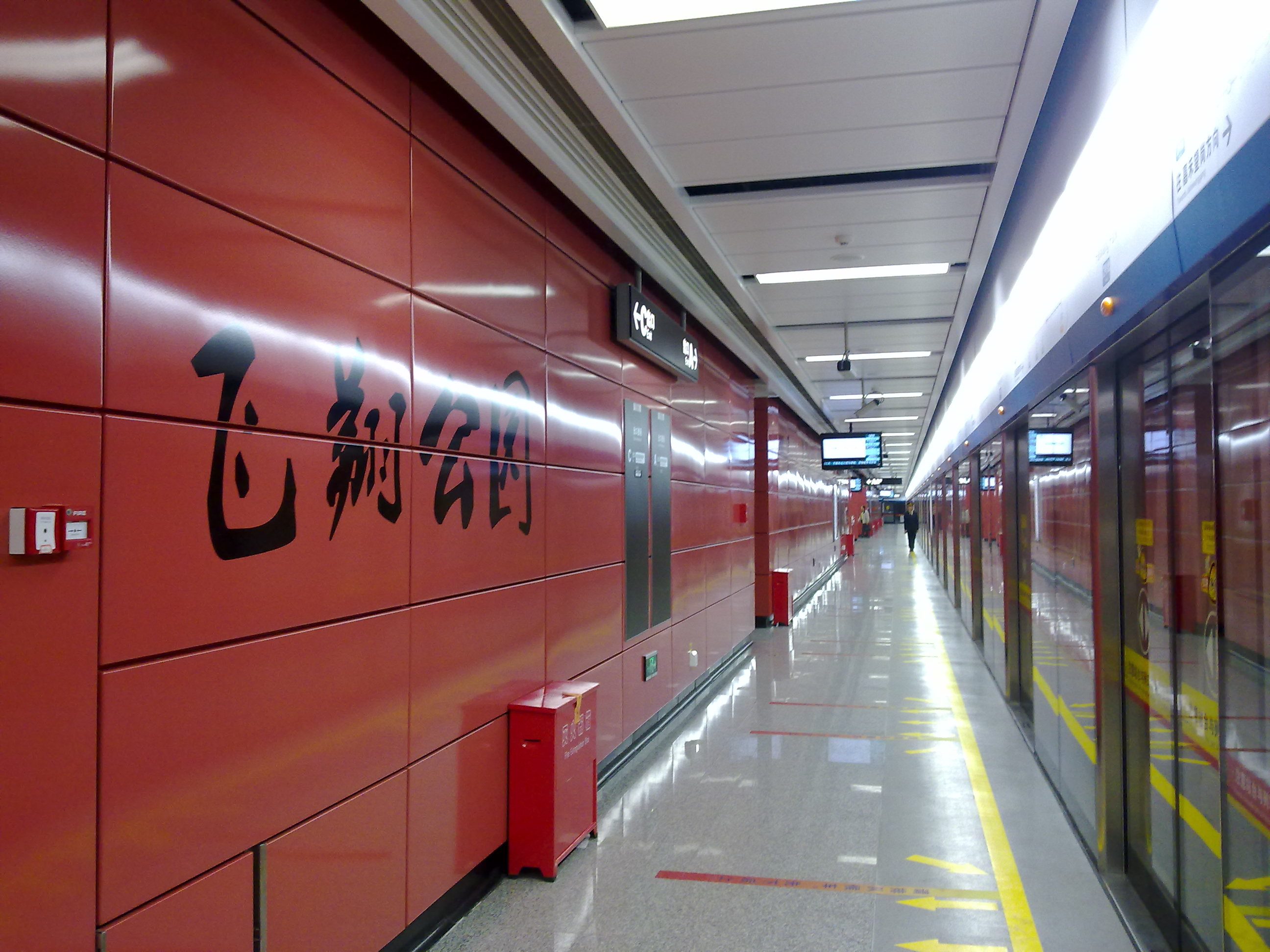 廣州地鐵飛翔公園站站台